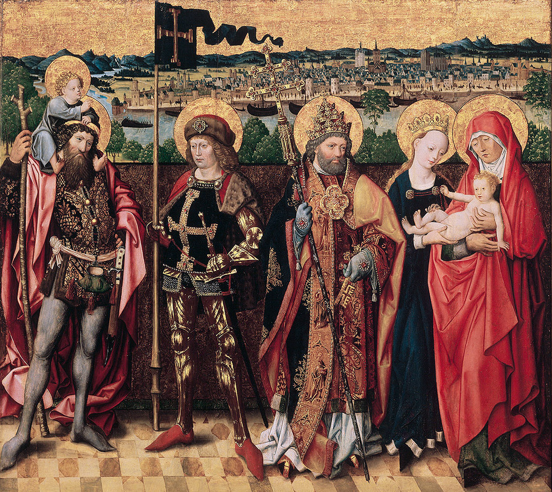 Anne trinitaire avec saints